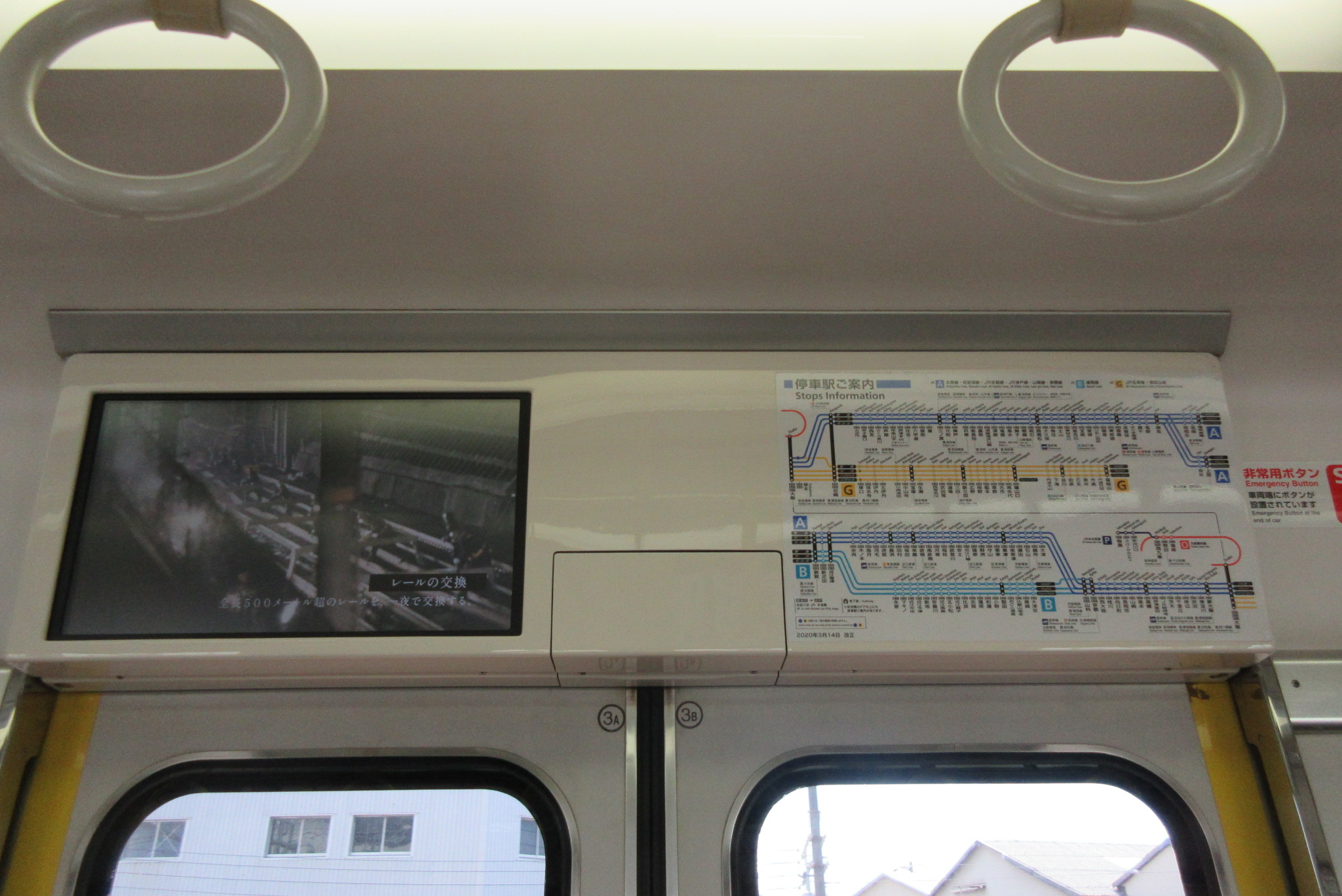 223系V13編成の液晶ディスプレイ（広告）